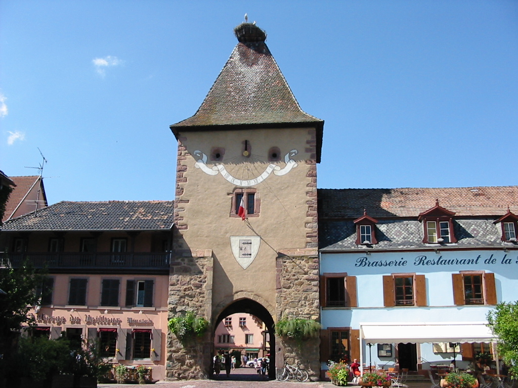 La Porte basse à Turckheim (Haut-Rhin)